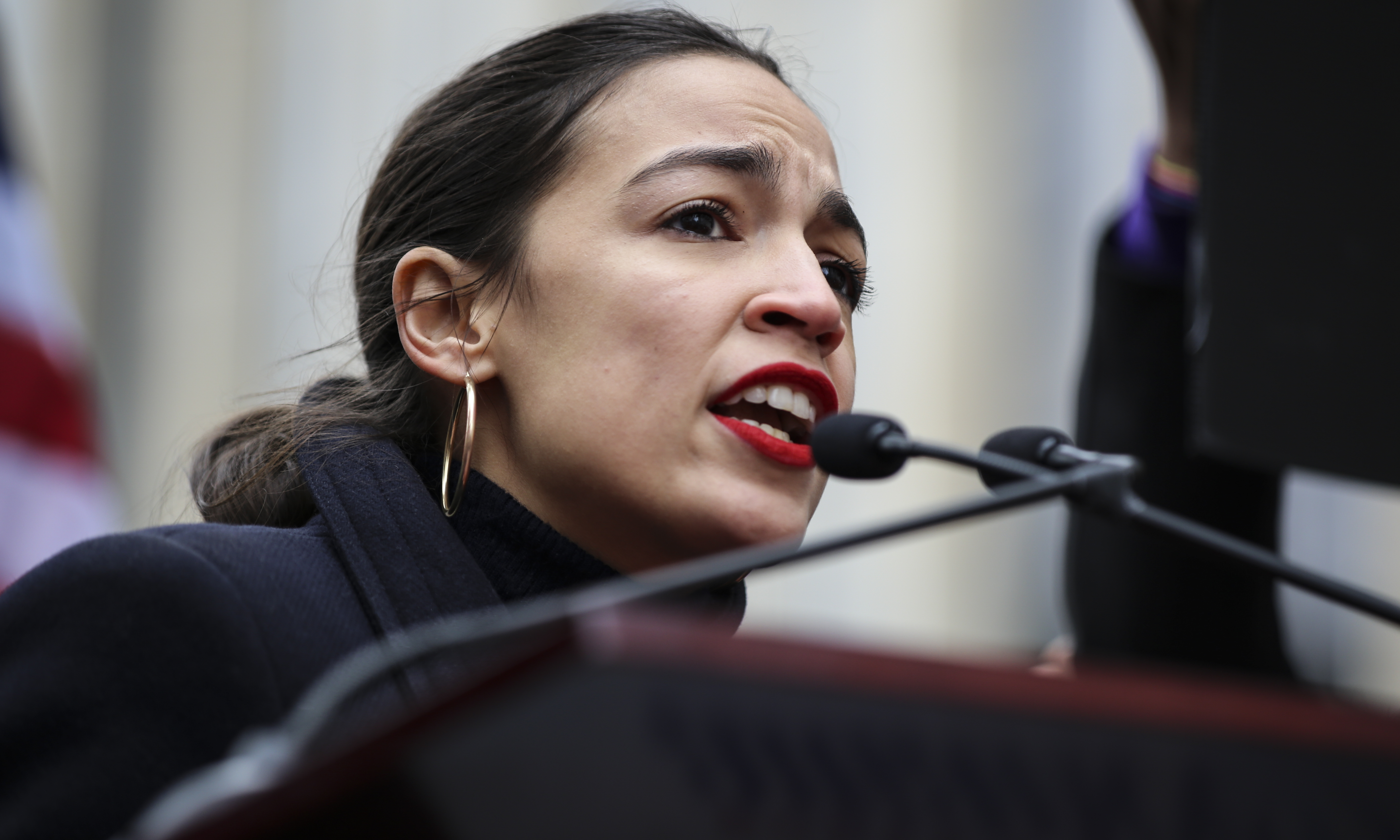 Alexandria Ocasio-Cortez @ Women's March NYC